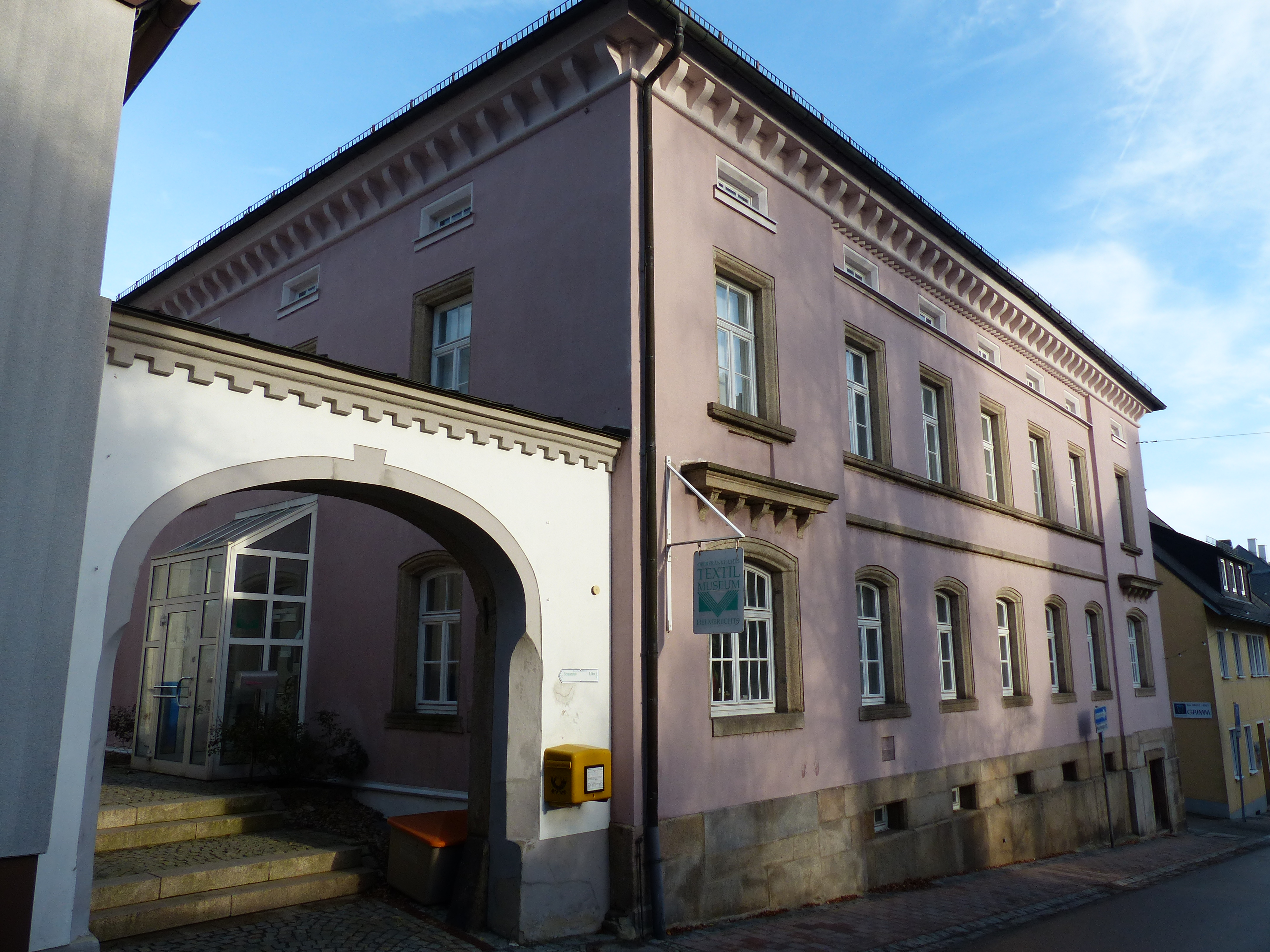 Außenansicht des Oberfränkischen Textilmuseums in Helmbrechts